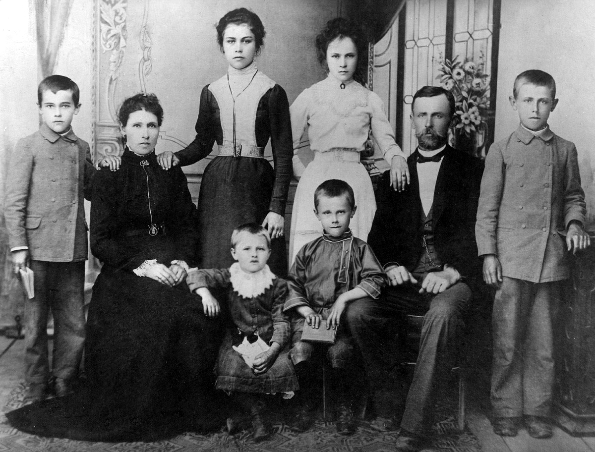 Семья Паффенгольц (Paffenholz) из села Албинец, Бессарабская губерния. Паффенгольц Николай Яковлевич (1855-1910), его жена Идалия Федоровна Захер (Saiher). Дети: Наталья, Елена, Мария, Константин ( стоит с книгой), Николай и Александр.